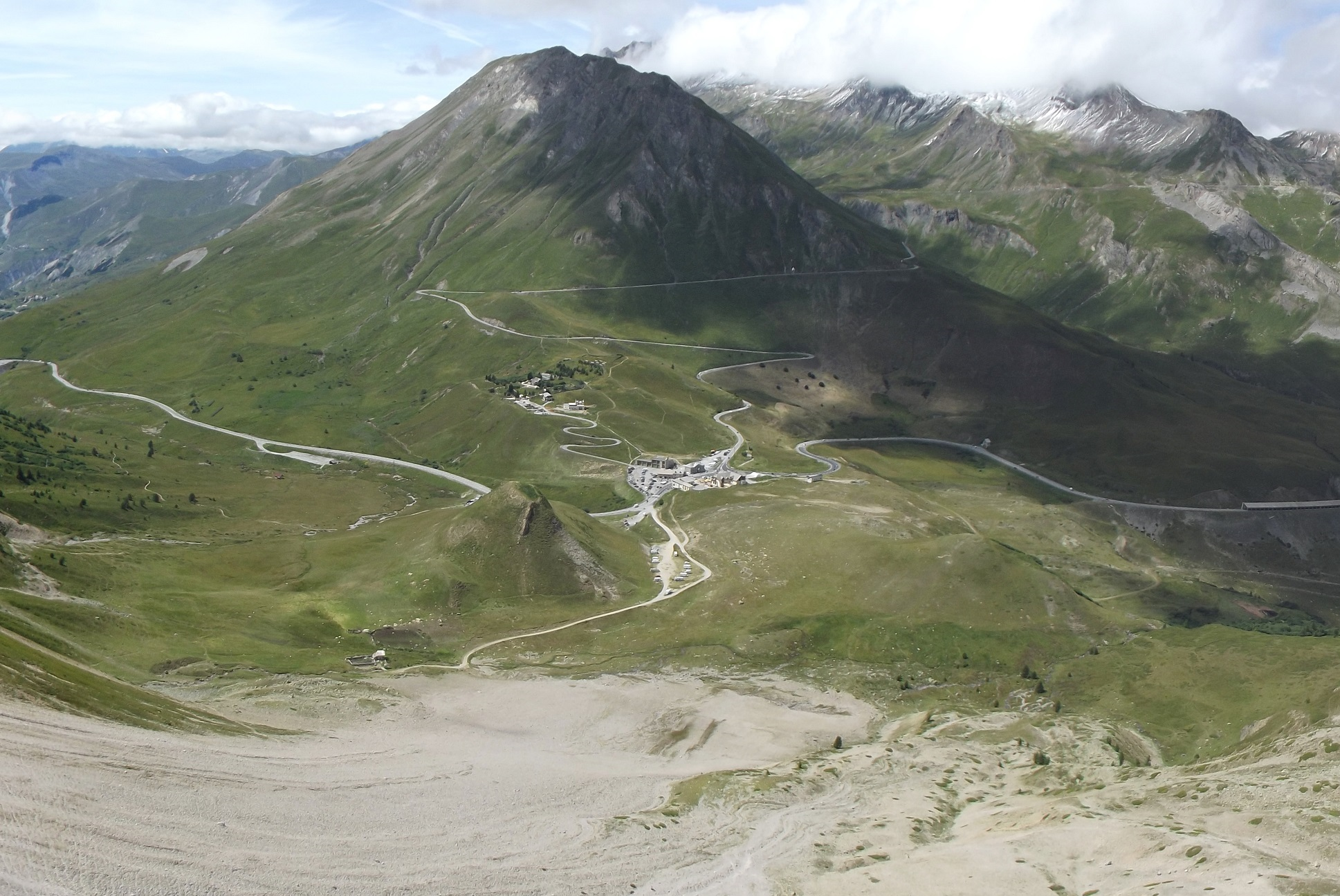 Environs du col du Lautaret vus des pentes du Combeynot. Au centre : hameau du Lautaret (au niveau du col) ; au-dessus : Jardin botanique alpin du Lautaret et route vers le col du Galiber ; la route allant de gauche à droite de l'image est la route départementale 1091 (ancienne route nationale 91).